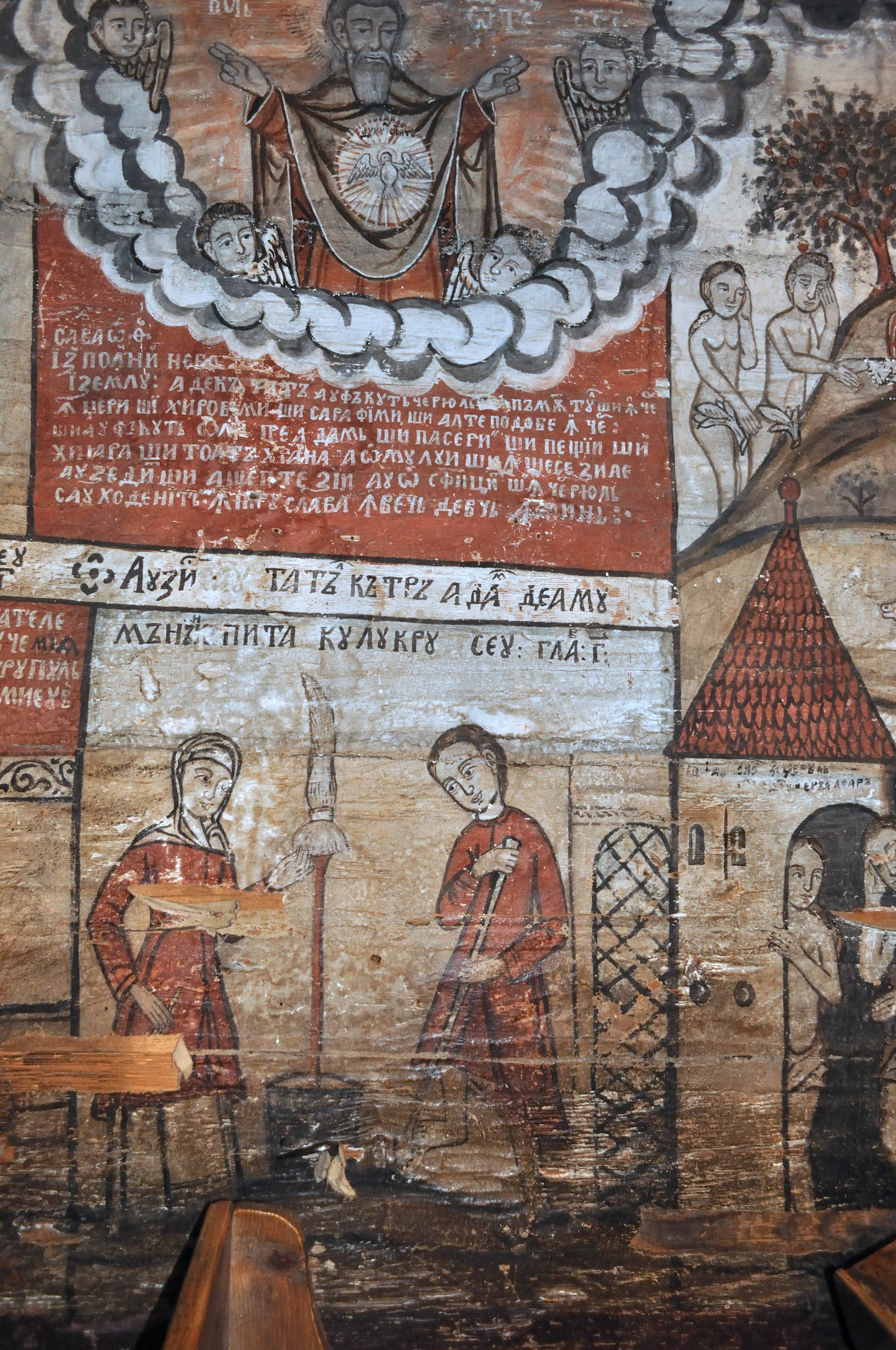 Biserica de lemn din Budești Susani, comuna Budești, județul Maramureș